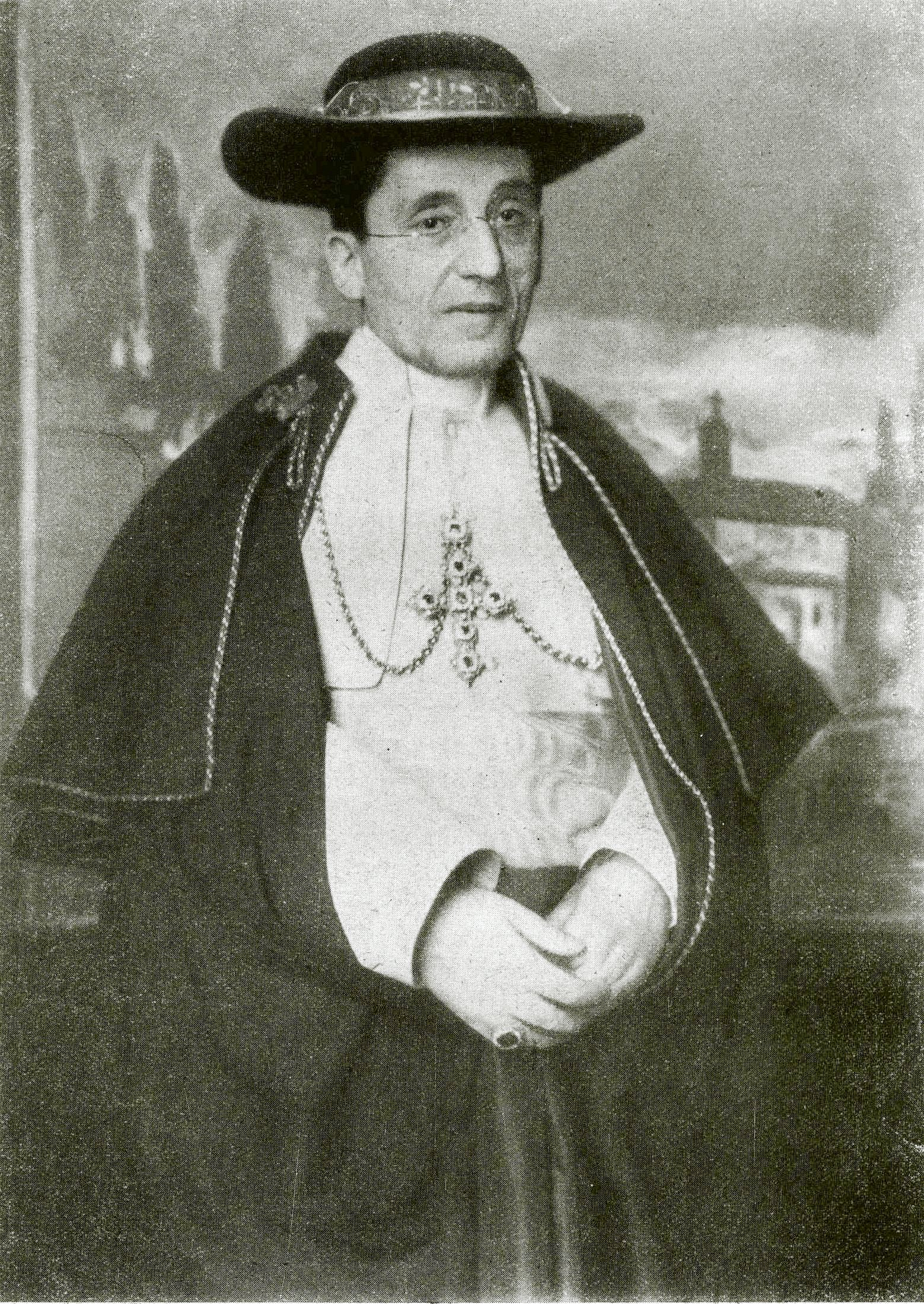 Pope Benedict XV (1854, 1922)